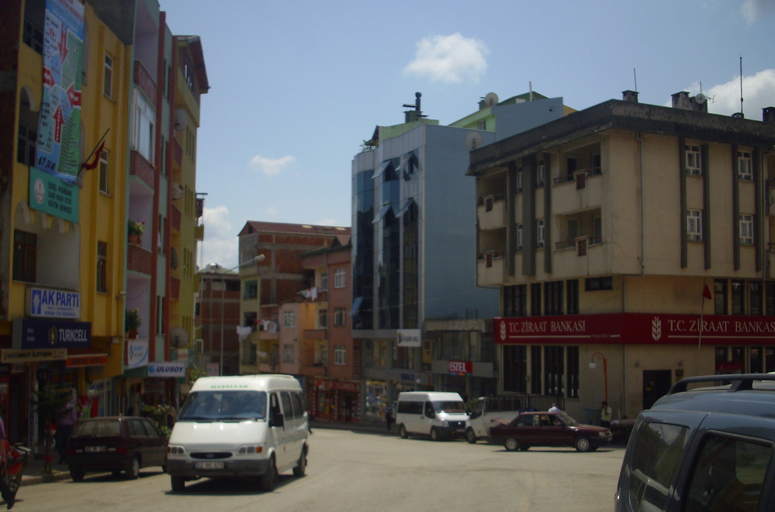 Ana Cadde